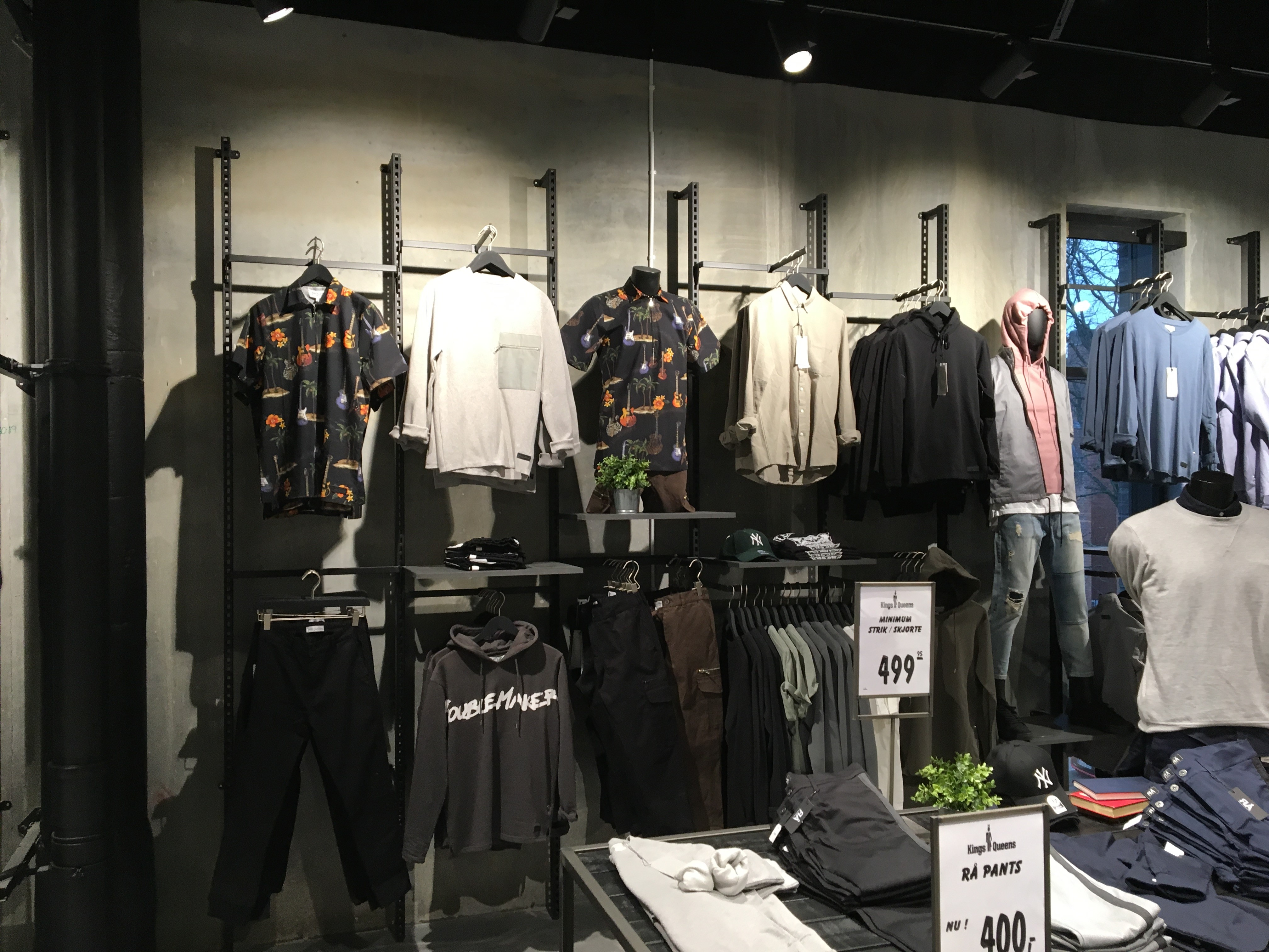 Drengetøj i Kings & Queens